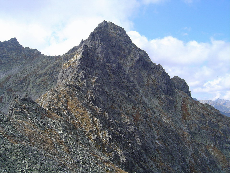 Velicky stit from Polsky hreben